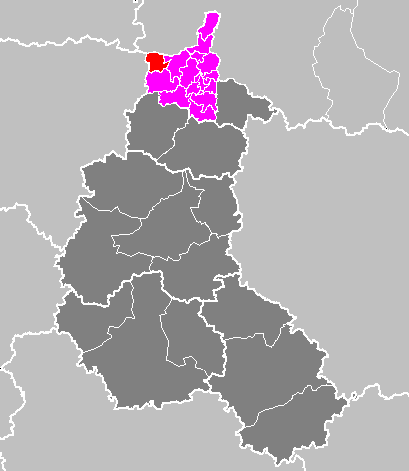 Maps of arrondissements and cantons of France: Arrondissement de Charleville-Mézières - Canton de Signy-le-Petit.PNG